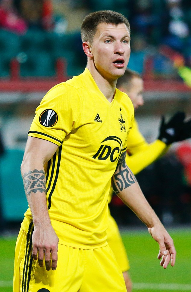 Veaceslav Posmac